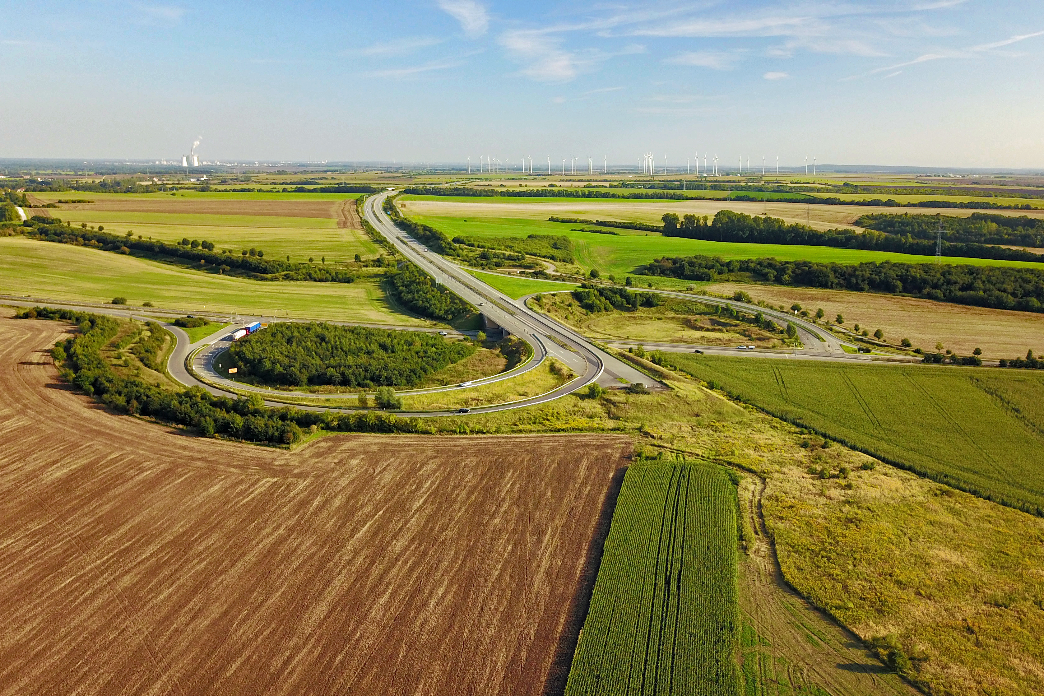 A 143 Auffahrt von der B 80 (vorläufiges Ende)